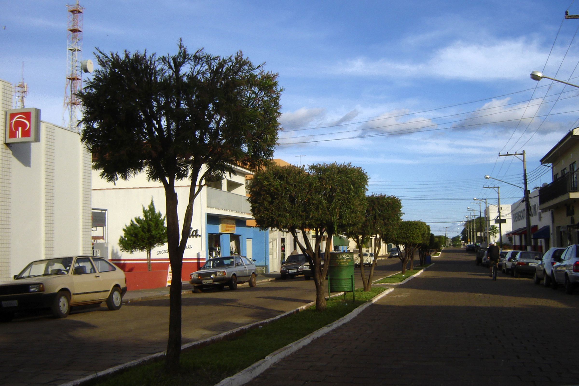 Município de Manduri, São Paulo, Brasil